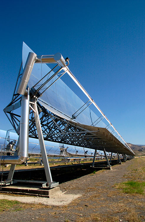 Diss collector